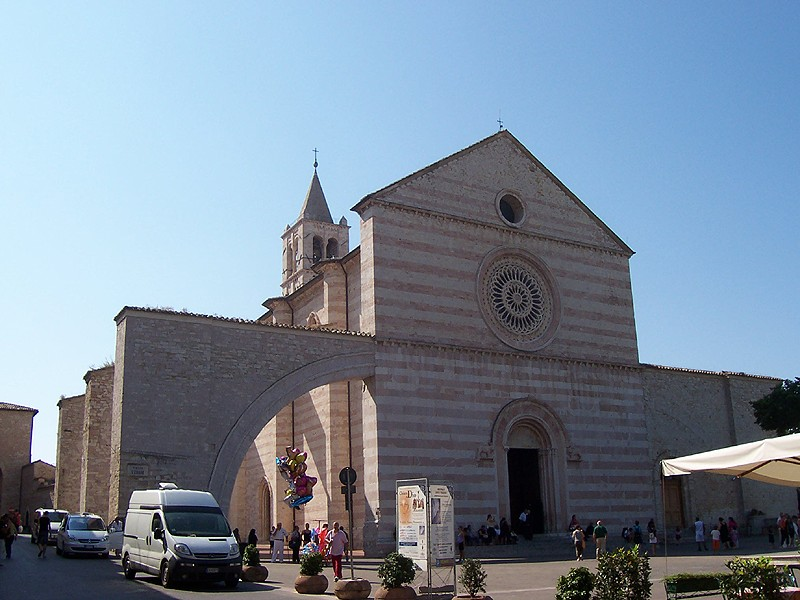 Assisi - Basilica di S. Chiara